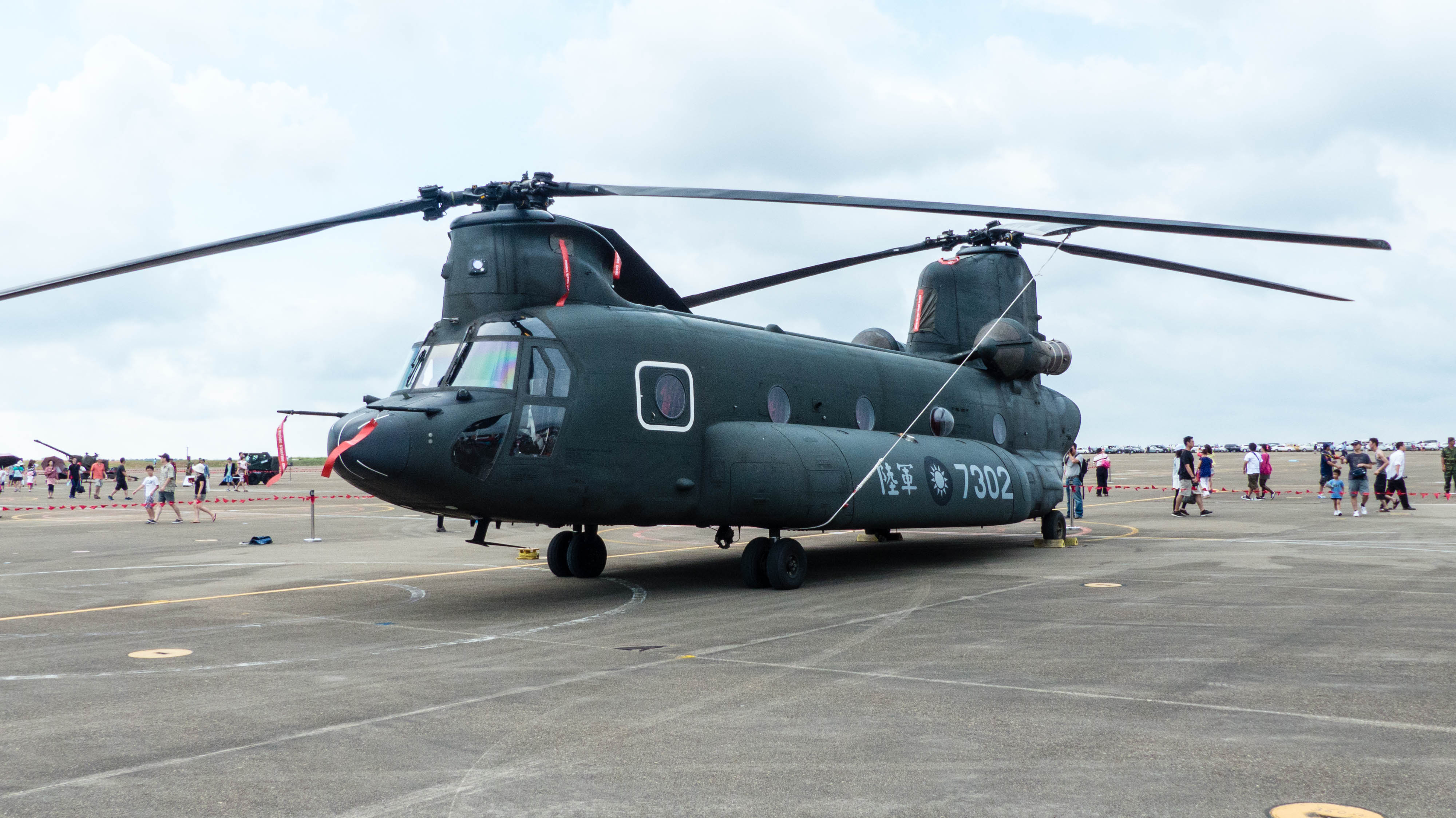 2014年空軍清泉崗基地營區開放活動，左前方所見會場靜態展示的陸軍運輸直升機CH-47 7302。